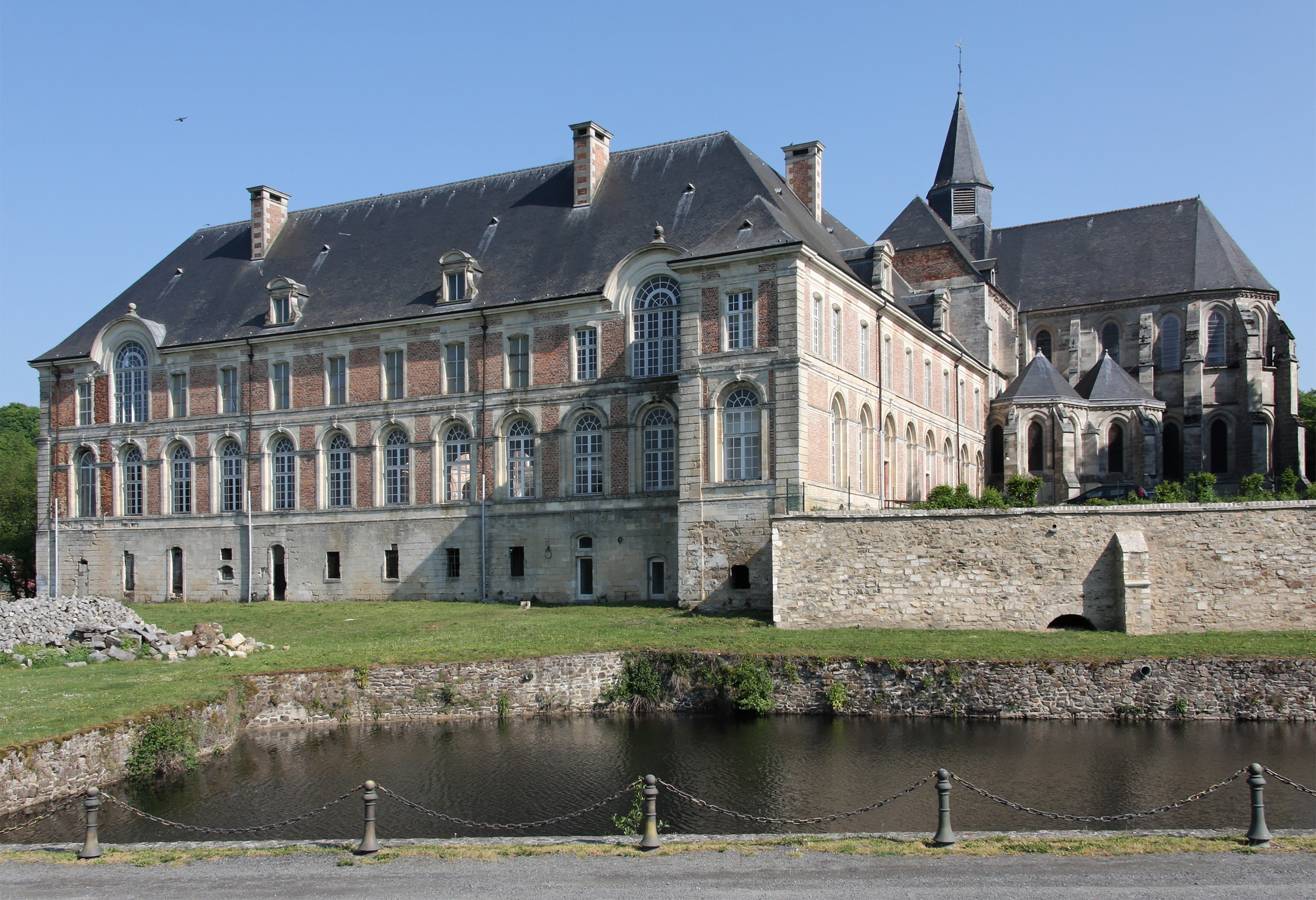 Abbaye de Saint-Michel (02)